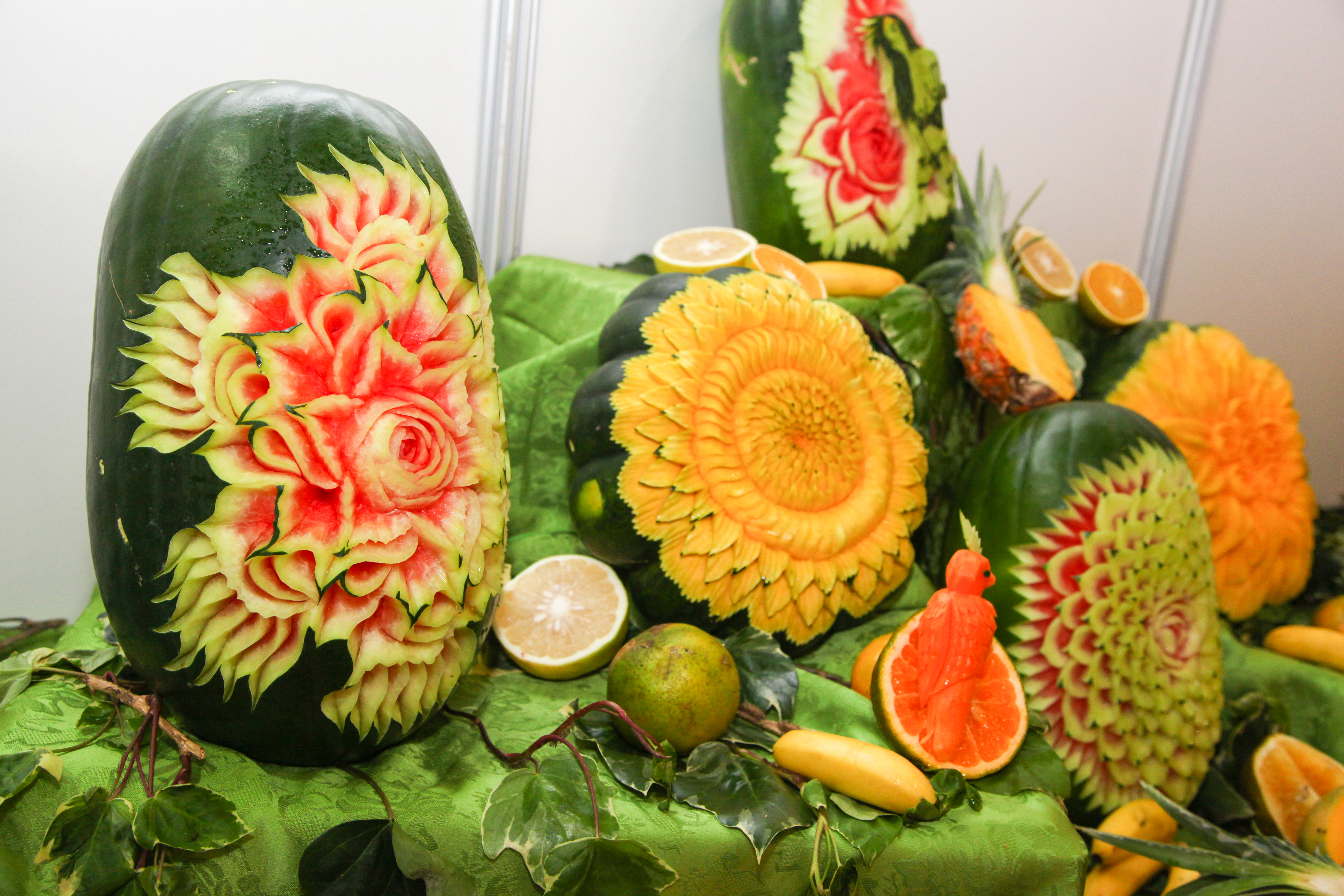 GASTRONOMÍA 2 COMIDAS PATRIMONIALES 030